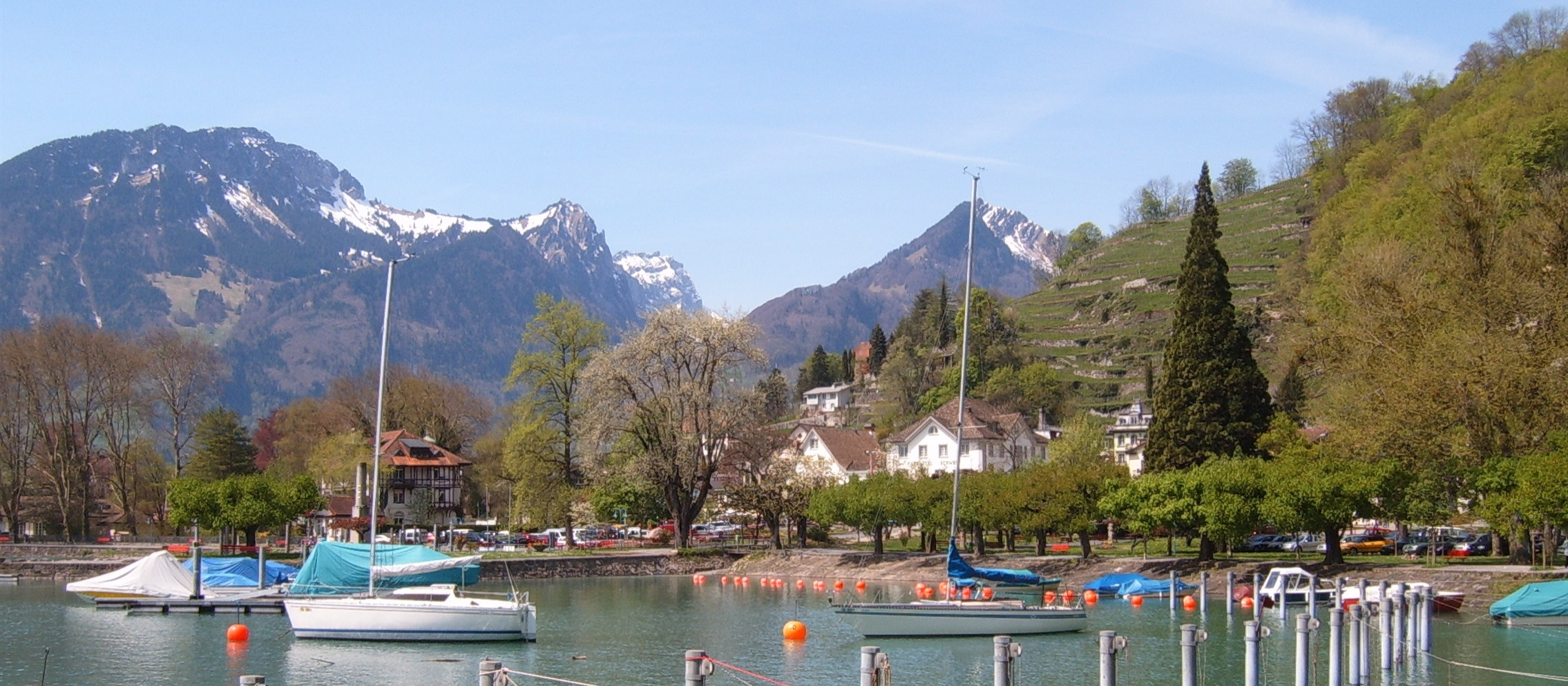 Weesen, Lake Walen (Switzerland)